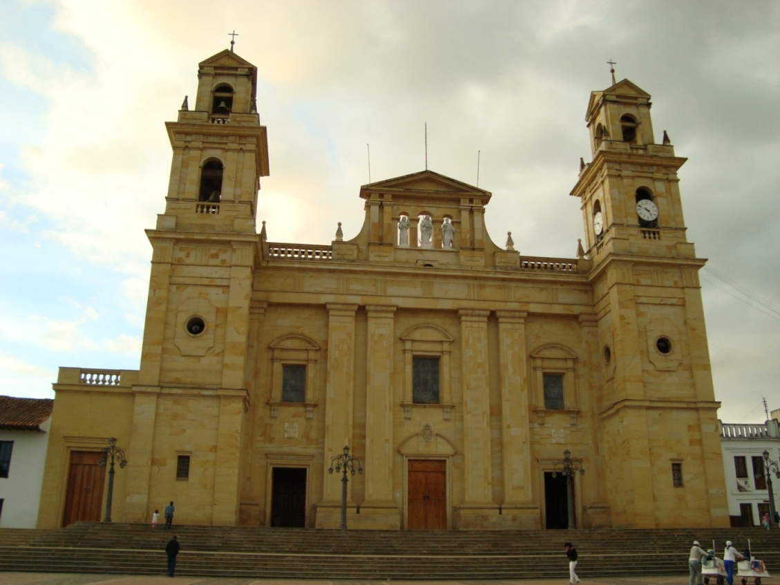 Basilica de la Virgen de Chiquinquirá en Boyaca Colombia